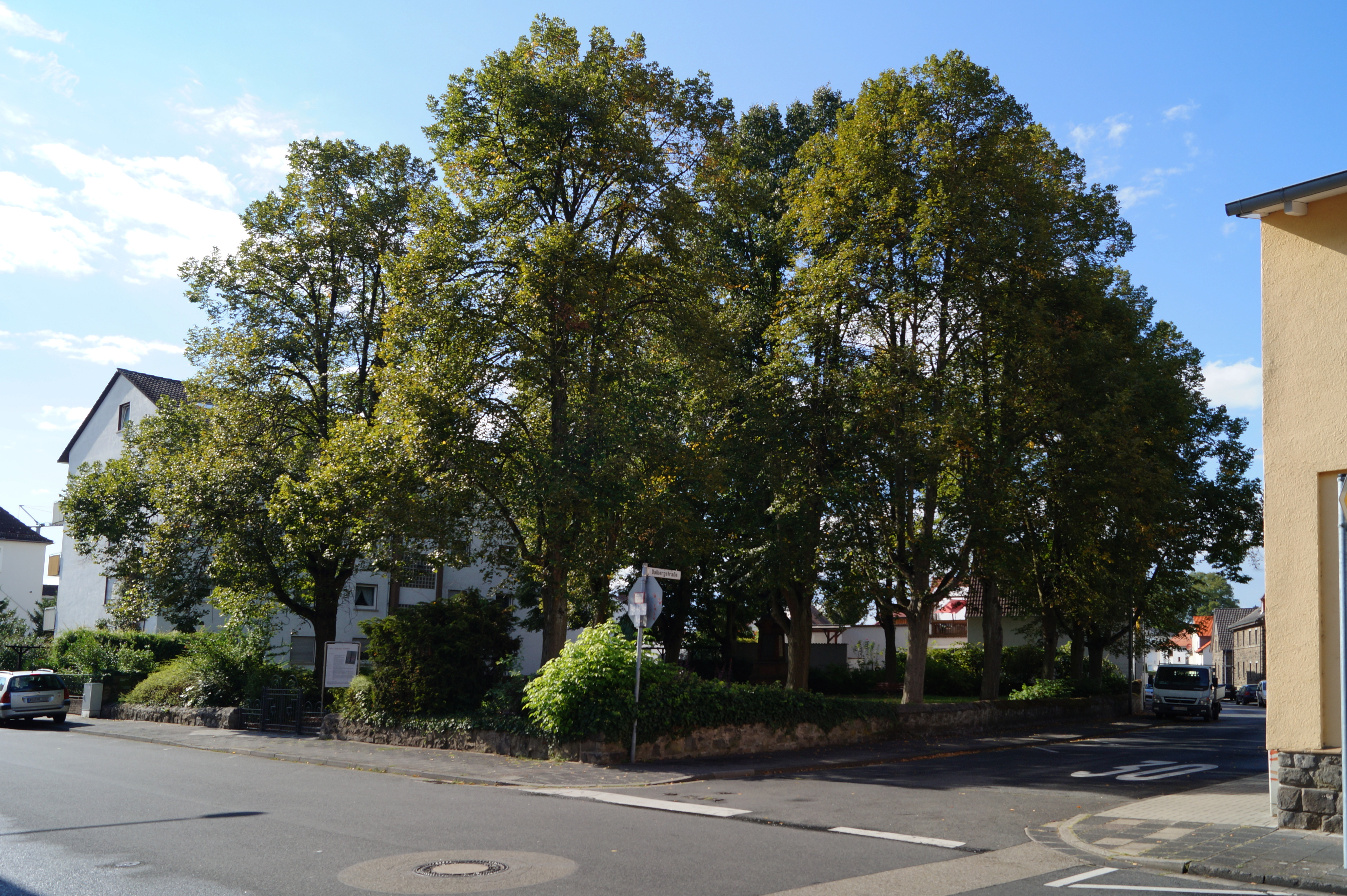 Alter Jüdischer Friedhof Steinheim, Stadt Hanau, Main-Kinzig-Kreis in Hessen. Ansicht der heutigen Grünanlage von Südosten.